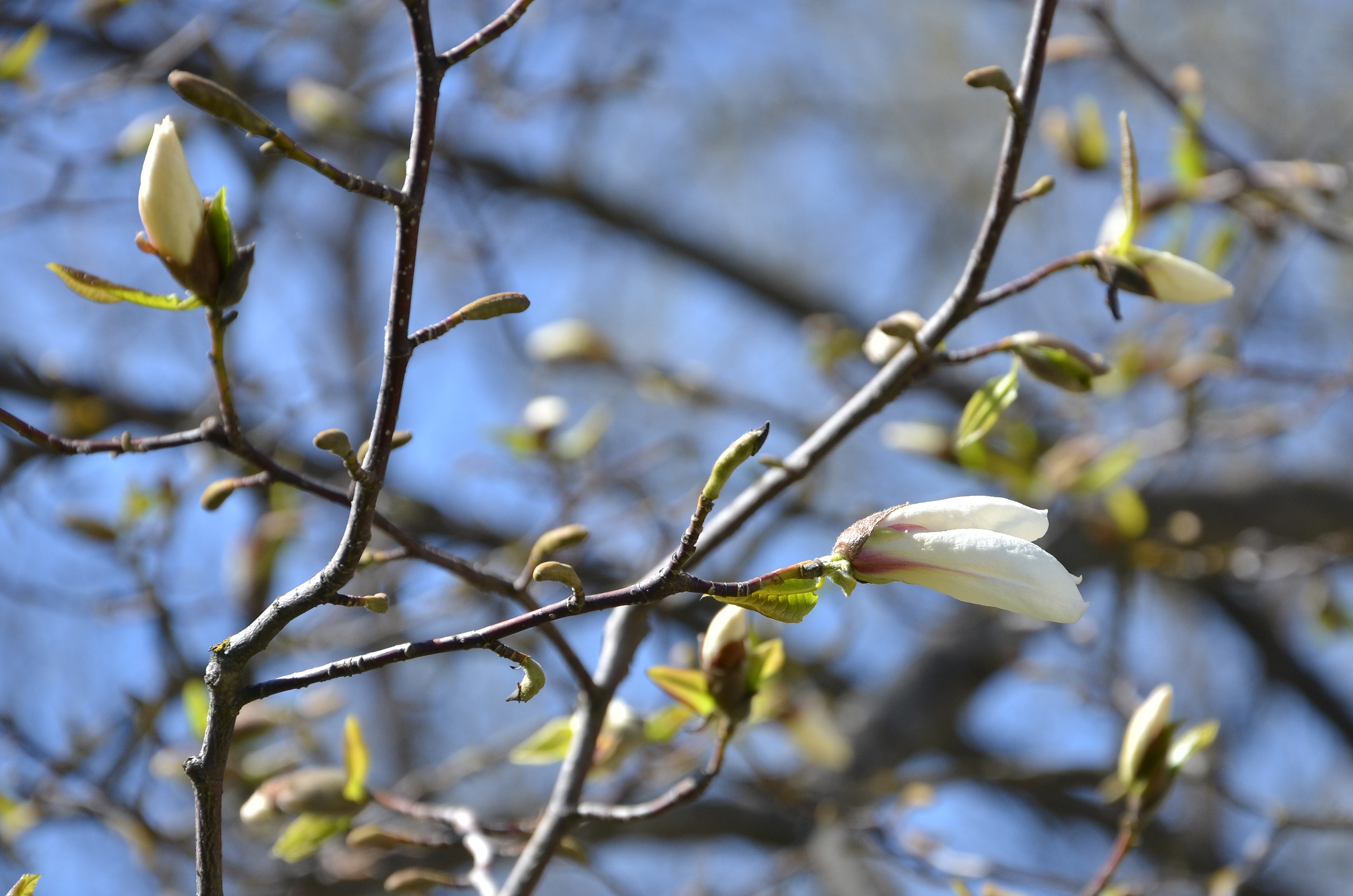 Весняний цвіт «Тернопільських магнолій».